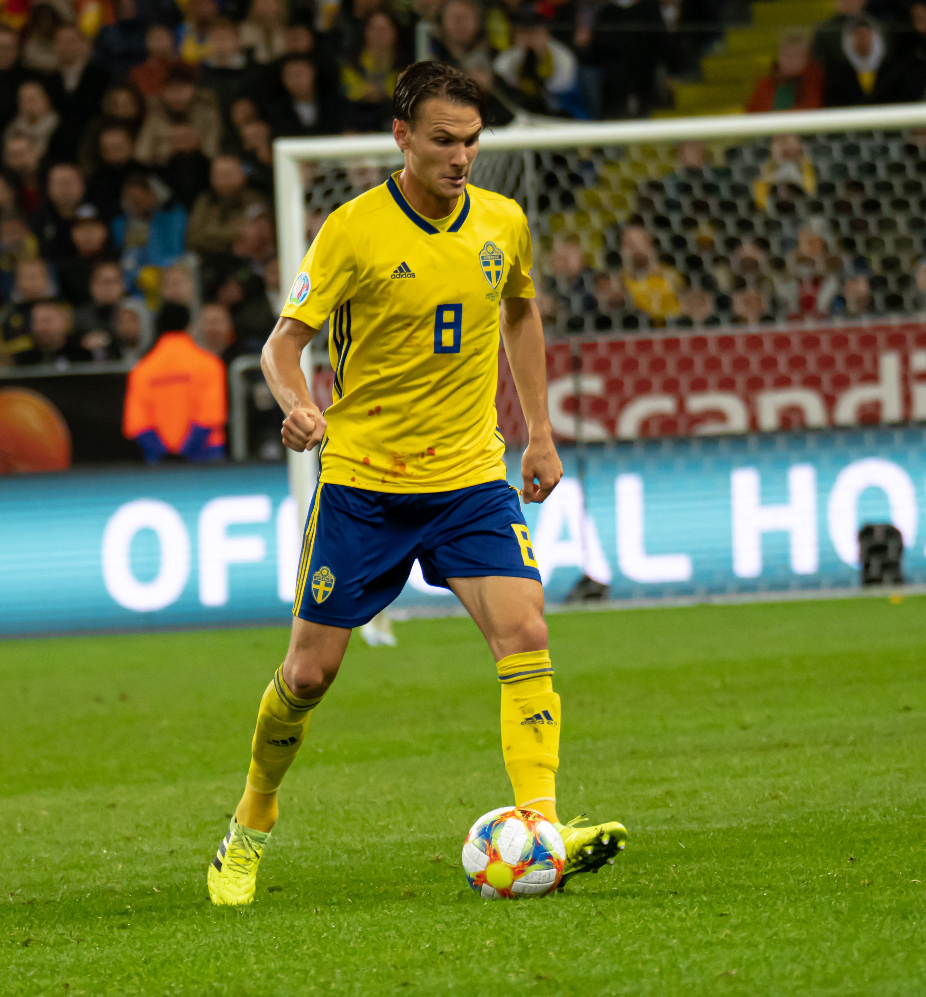 UEFA EURO qualifiers Sweden vs Spain 20191015